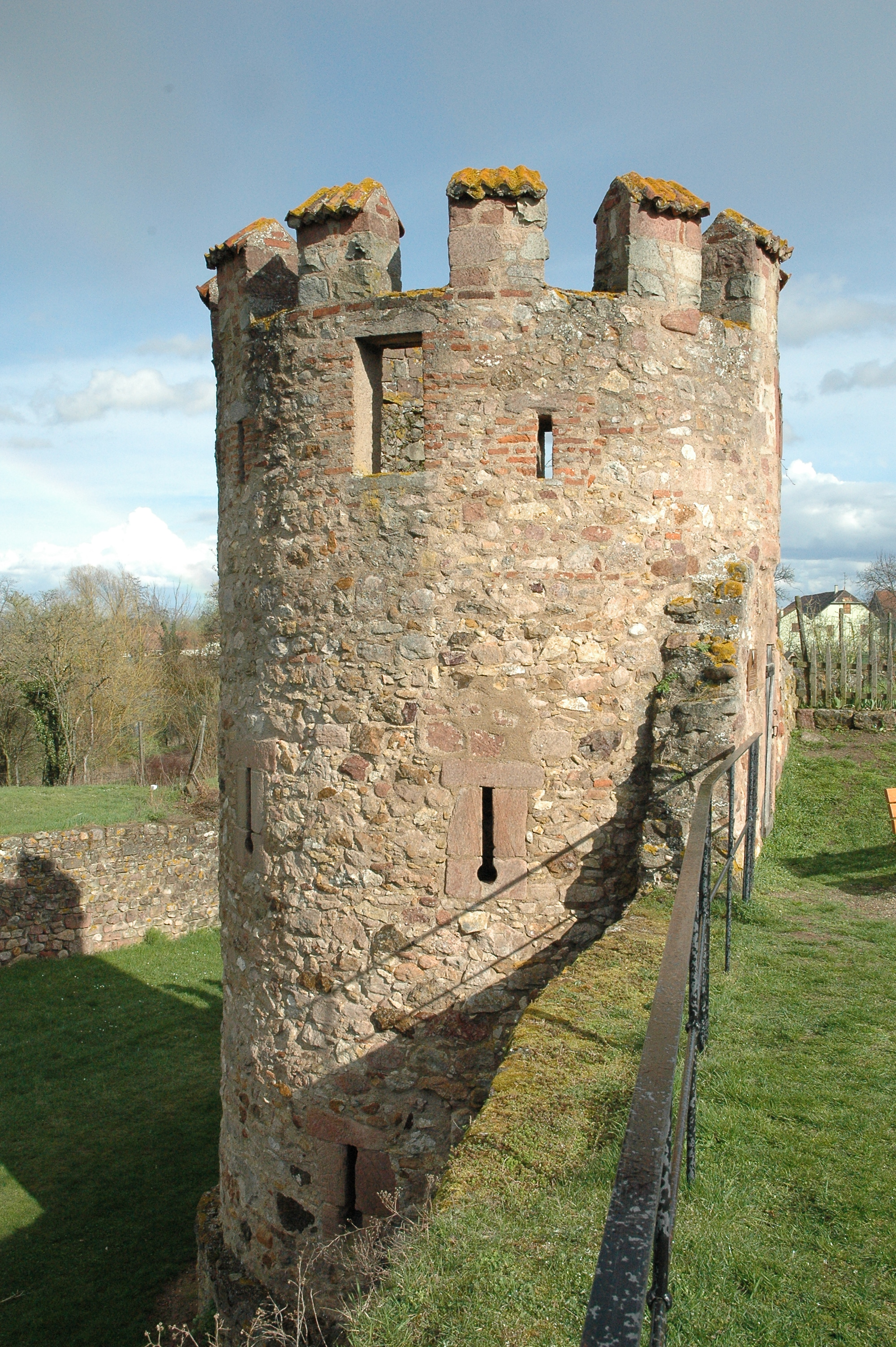 A 262